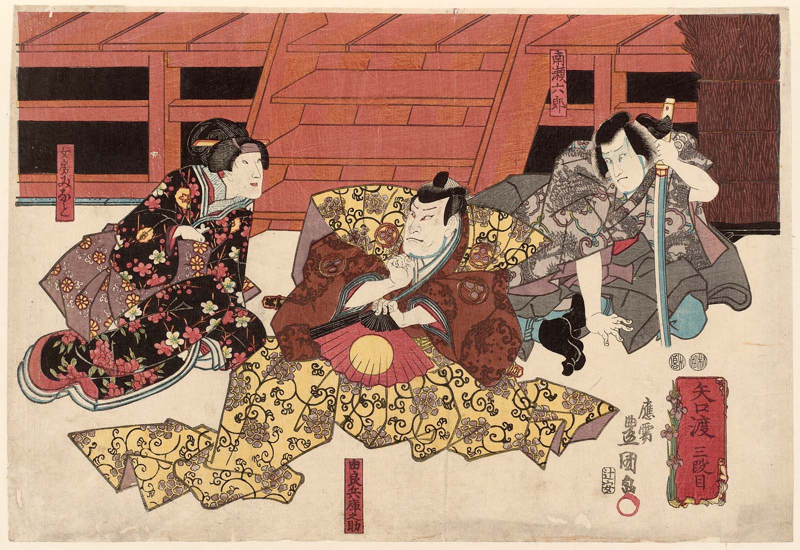 Kabuki Scene from "Shinrei Yaguchi no Watashi", Act 3 （『神霊矢口渡』 三段目より）